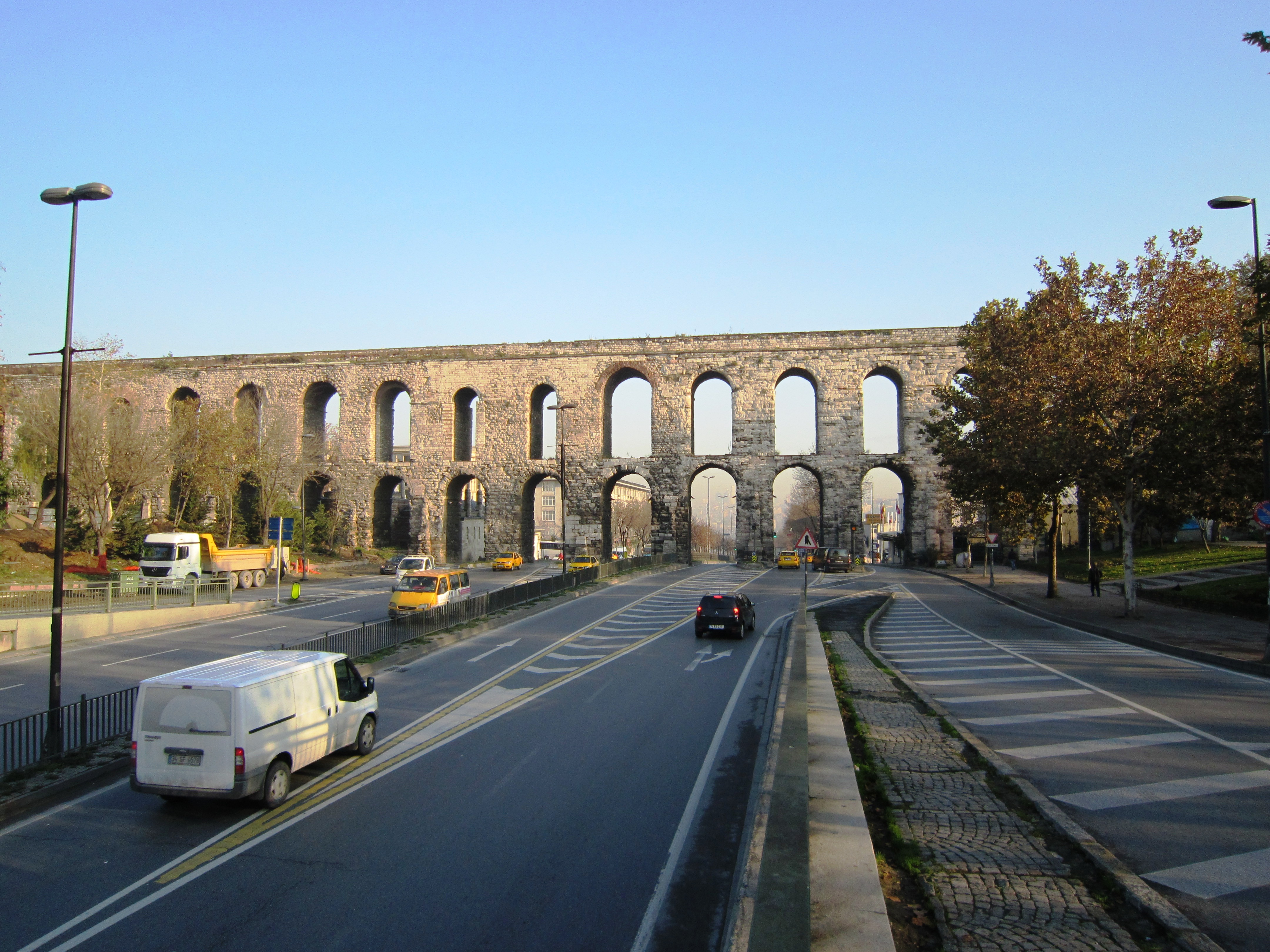 Valens aquaduct Istanboel